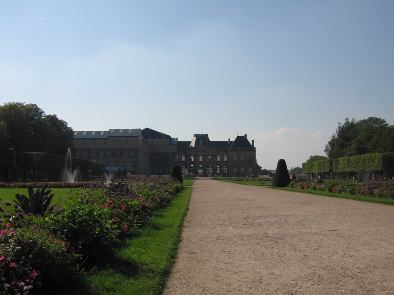 Château de Lunéville vu du Parc des Bosquets, cliché personnel, été 2005.